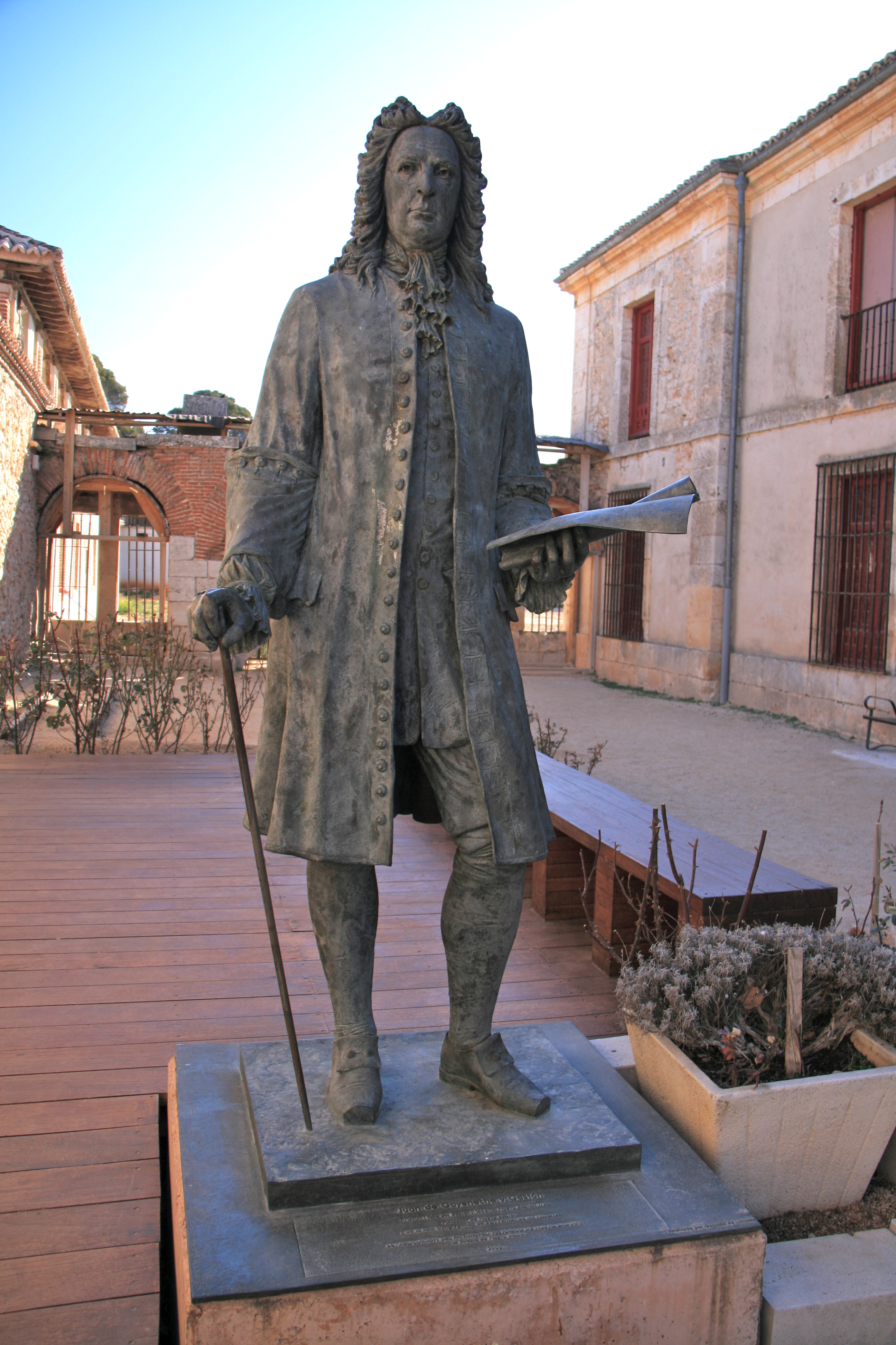 Juan de Goyeneche Gaston - Estatua (Nuevo Baztán)